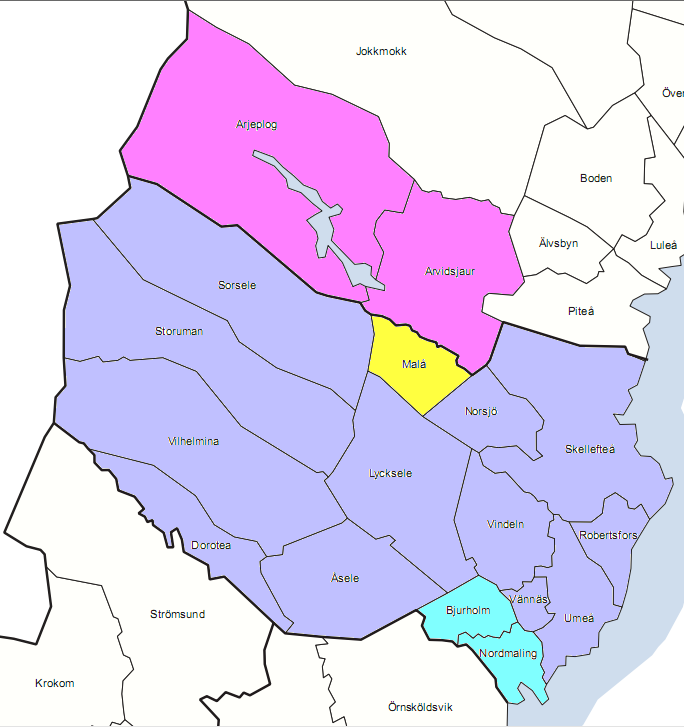 Västerbottens läns olika dragningar.